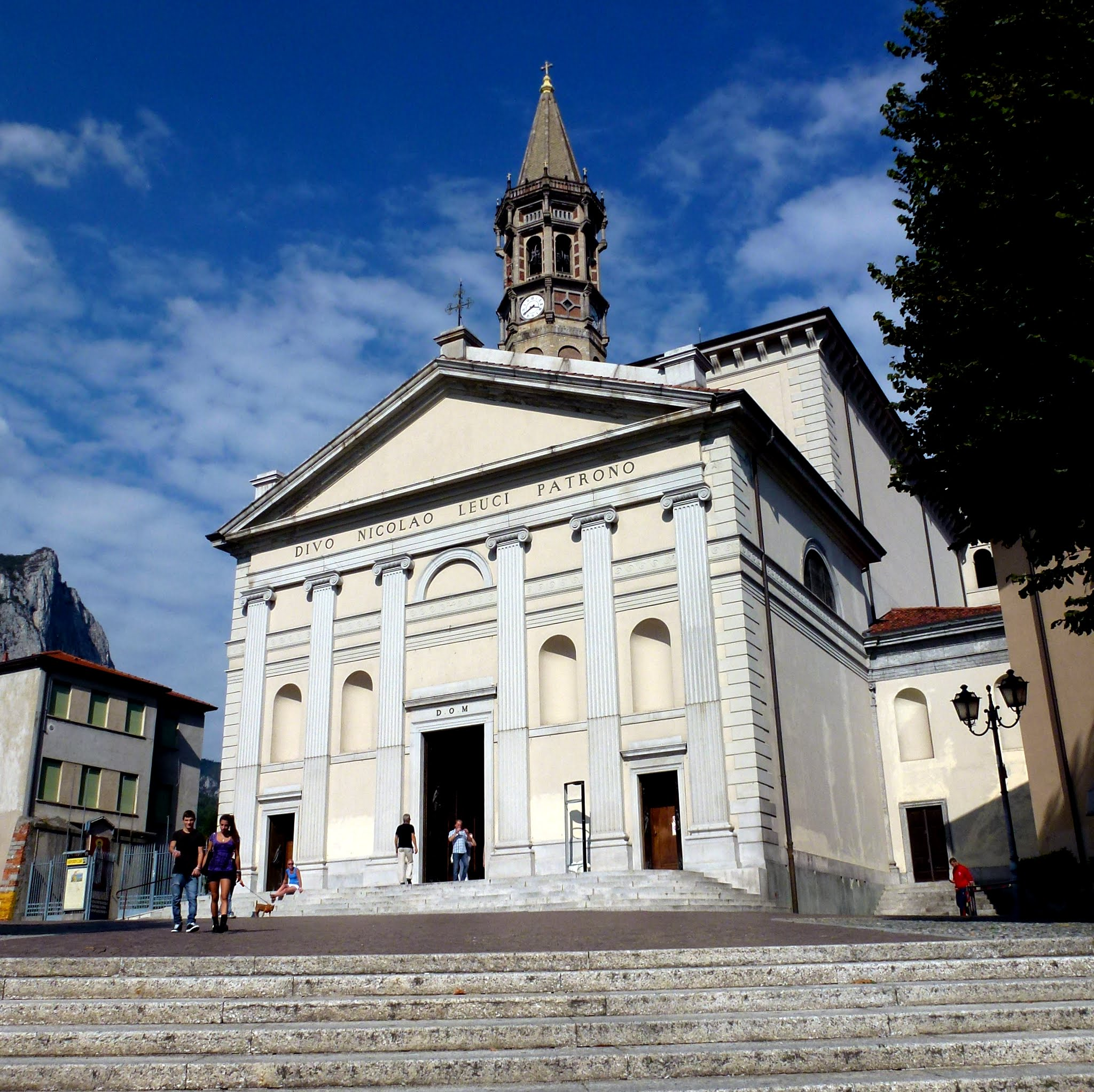 Basilica di San Nicolò, Lecco, Lombardy, Italy